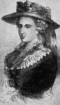 Anglická spisovatelka Ann Radcliffová